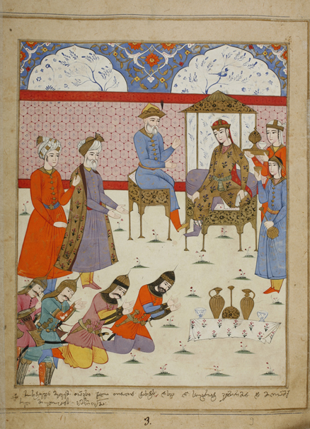 მინიატიურა წერეთლისეული ვეფხისტყაოსნიდან